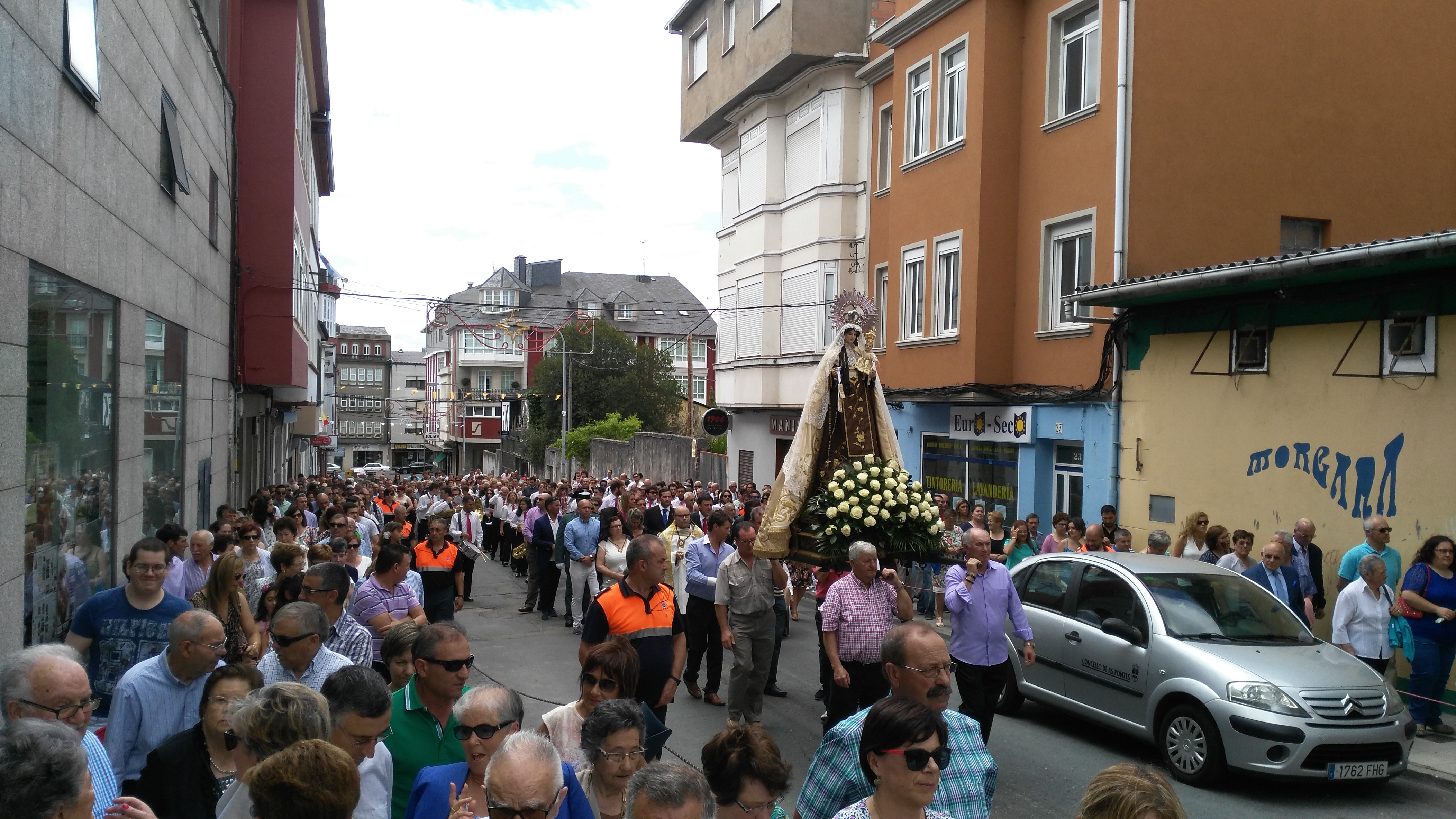 Procesión diurna da Virxe do Carme en As Pontes de García Rodríguez, 2015